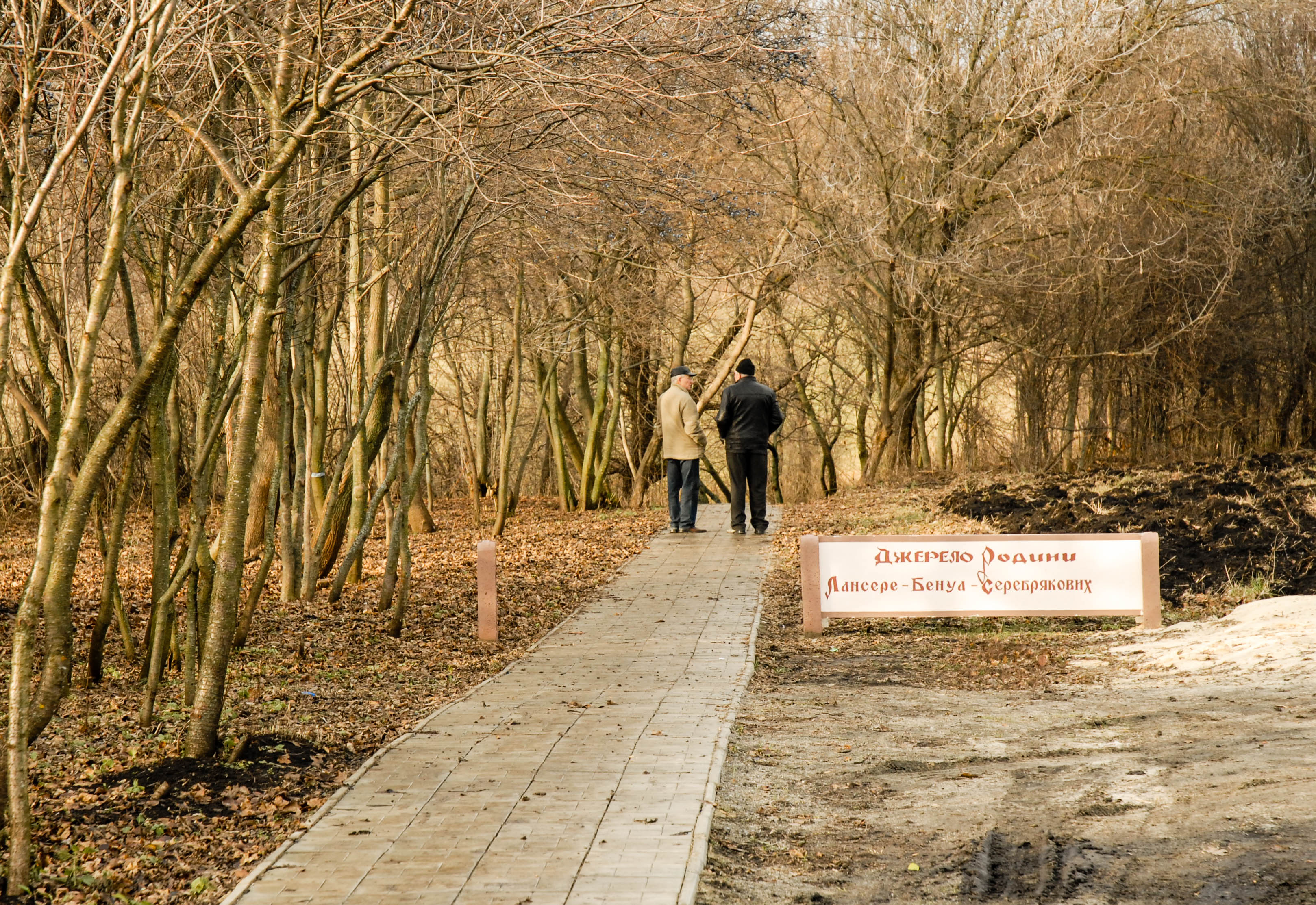 Знято під час урочистостей з нагоди Дня Народження художниці Зінаїди Серерякової